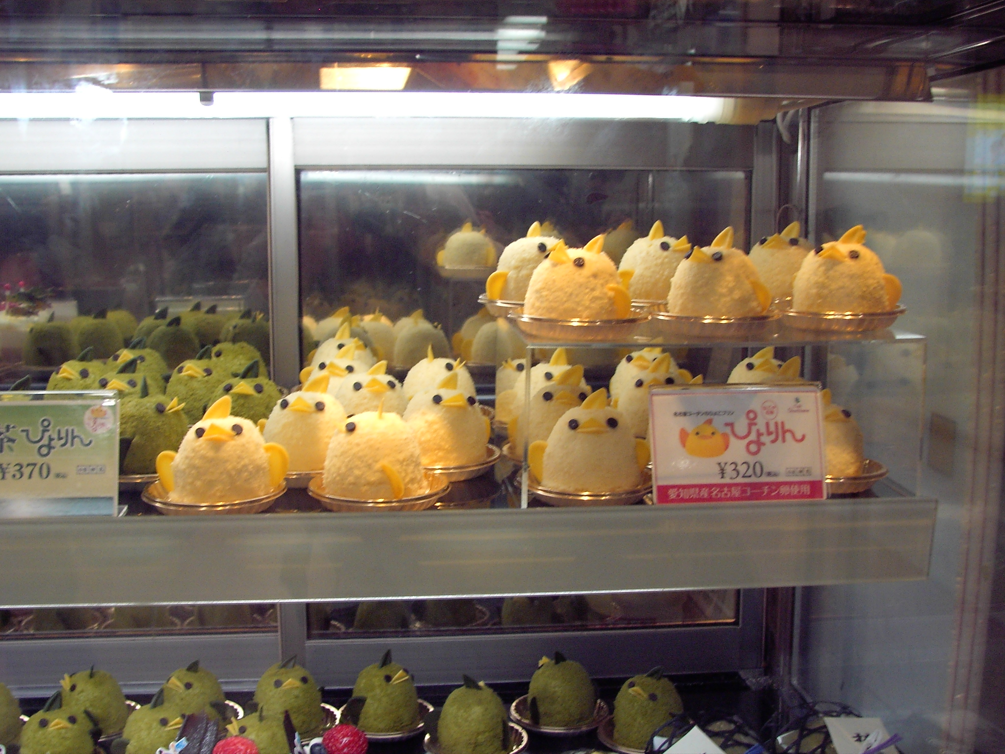 ショーケースのぴよりん